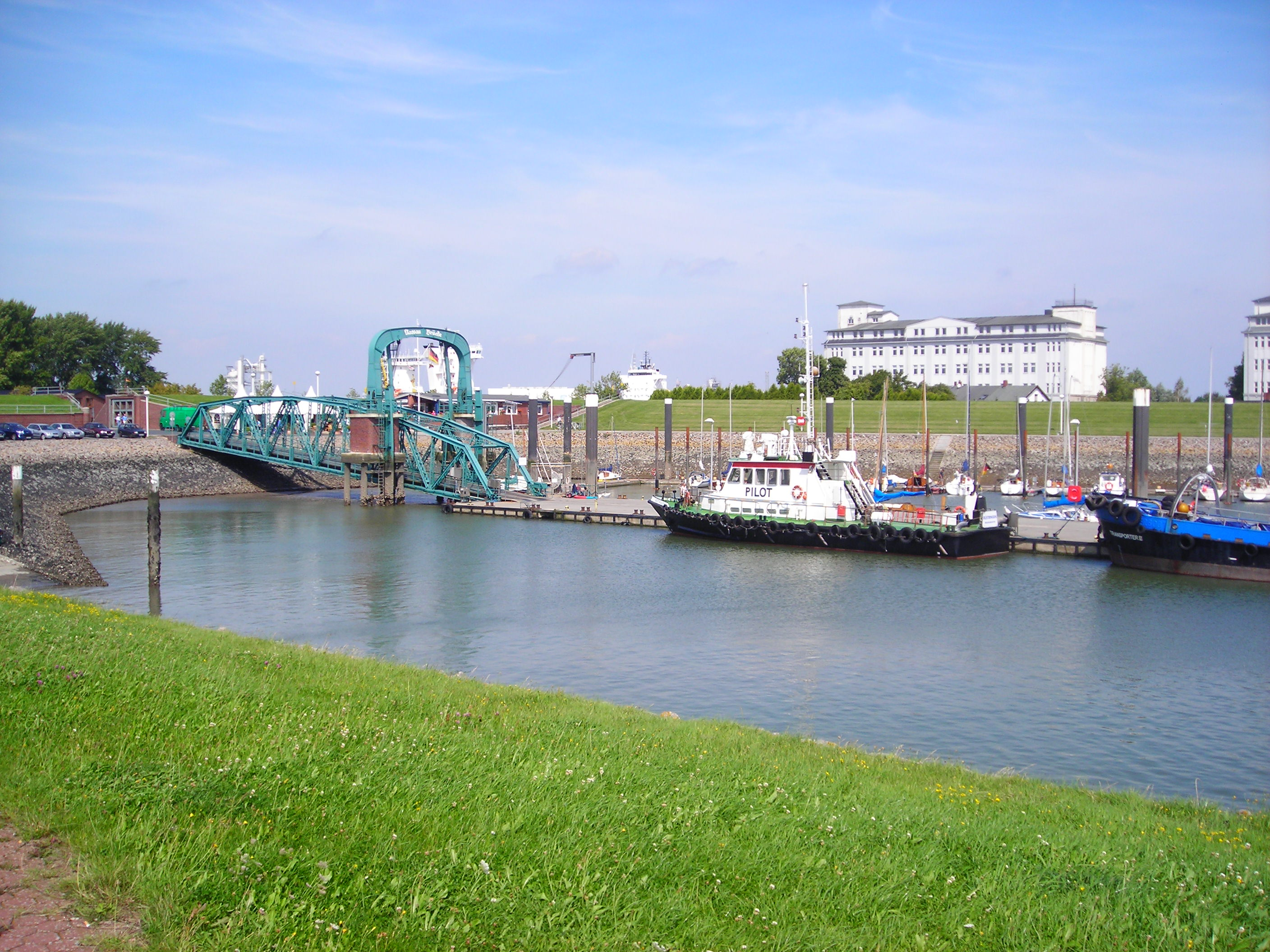 Die Nassaubrücke im Pontonhafen (auch Nassauhafen genannt), dem nördlichen Teil des Wilhelmshavener Flut- und Pontonhafens. Im Vordergrund das Lotsenboot Rüstringen.